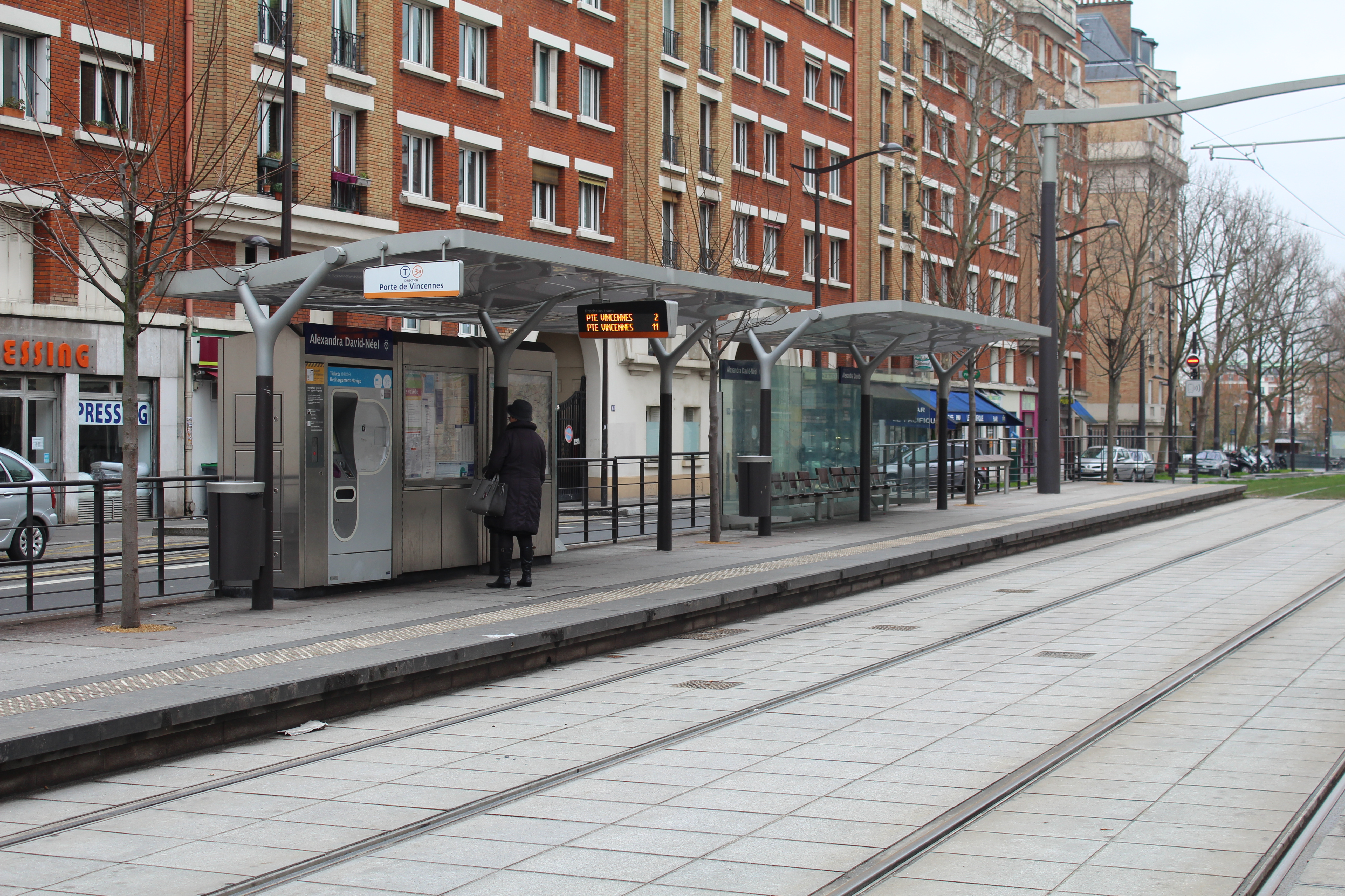 Station de tramway Alexandra David-Néel sur la ligne 3a du tramway d'Île-de-France.